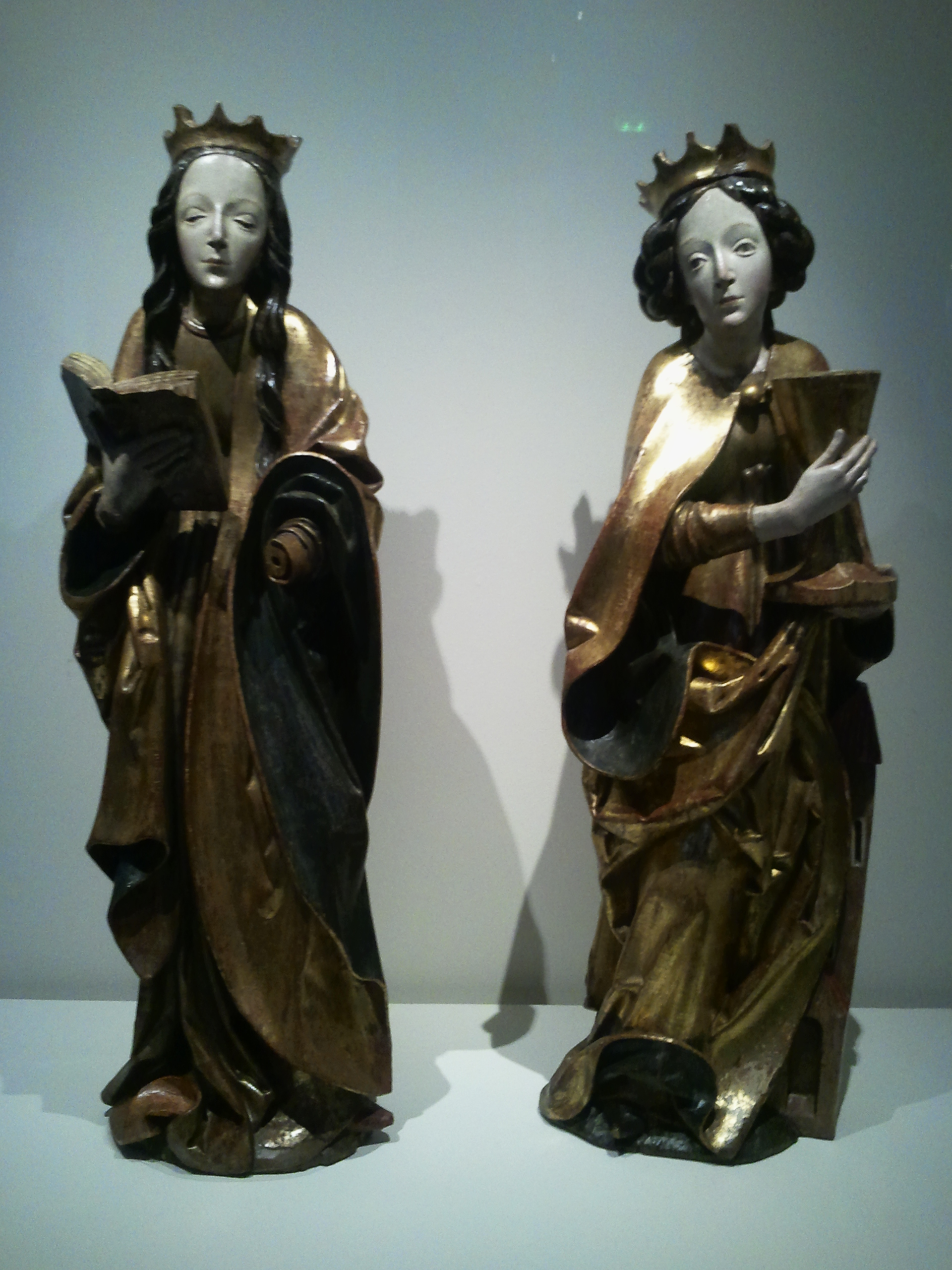 Statues polychromes en tilleul de sainte Barbe et de sainte Catherine, réalisées par Paul de Levoča avant 1509 pour le retable de la Vierge, dans l’église catholique romaine Saint-Pierre-d’Alkantara d’Okoličné, quartier de la ville de Liptovský Mikuláš, au nord de la Slovaquie, présentées à Paris au musée national du Moyen Âge dans le cadre de l’exposition D’or et de Feu, l’art en Slovaquie à la fin du Moyen Âge entre le 16 septembre 2010 et le 10 janvier 2011.